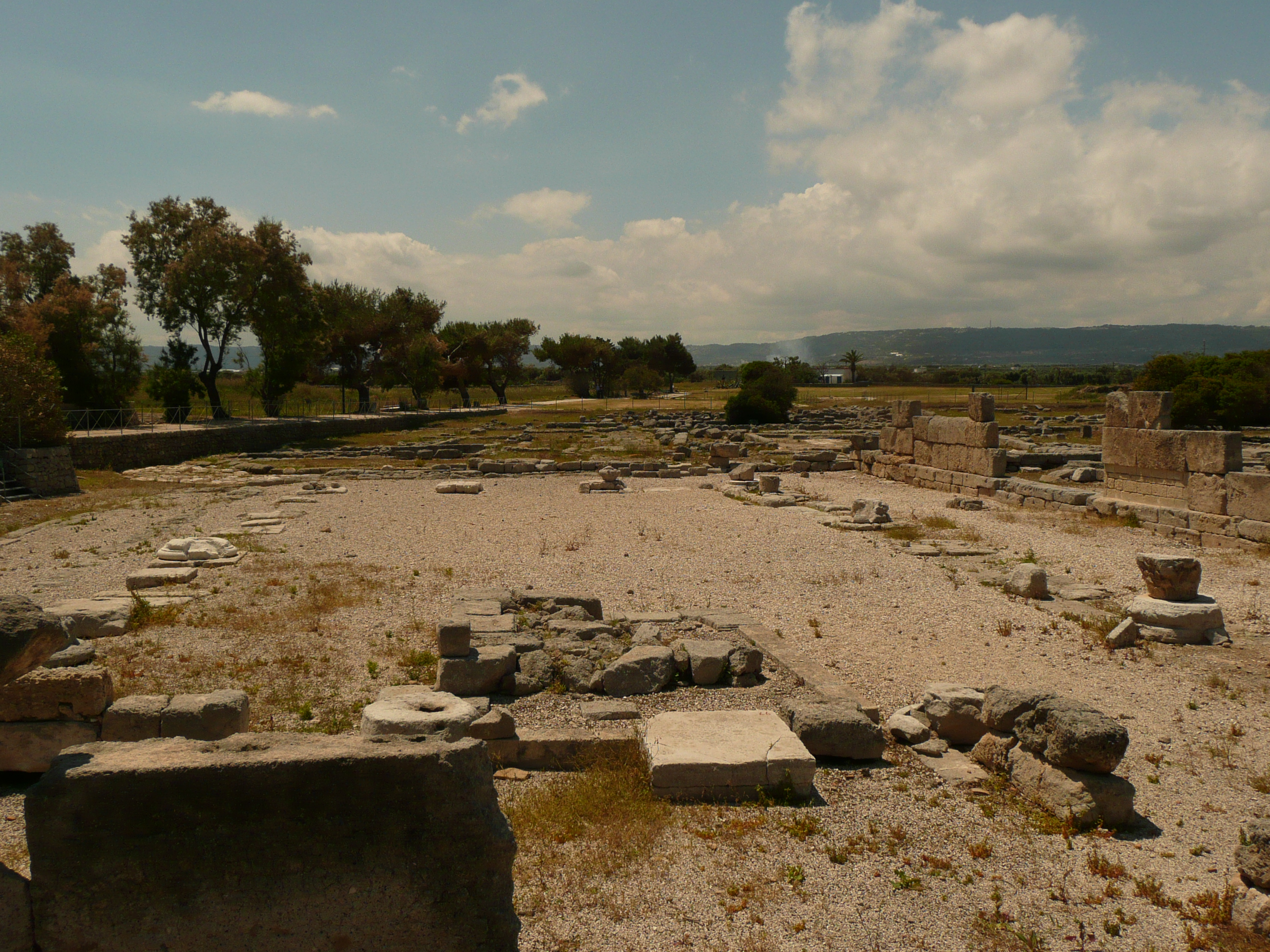 Parque arqueológico de Egnazia, Apulia.